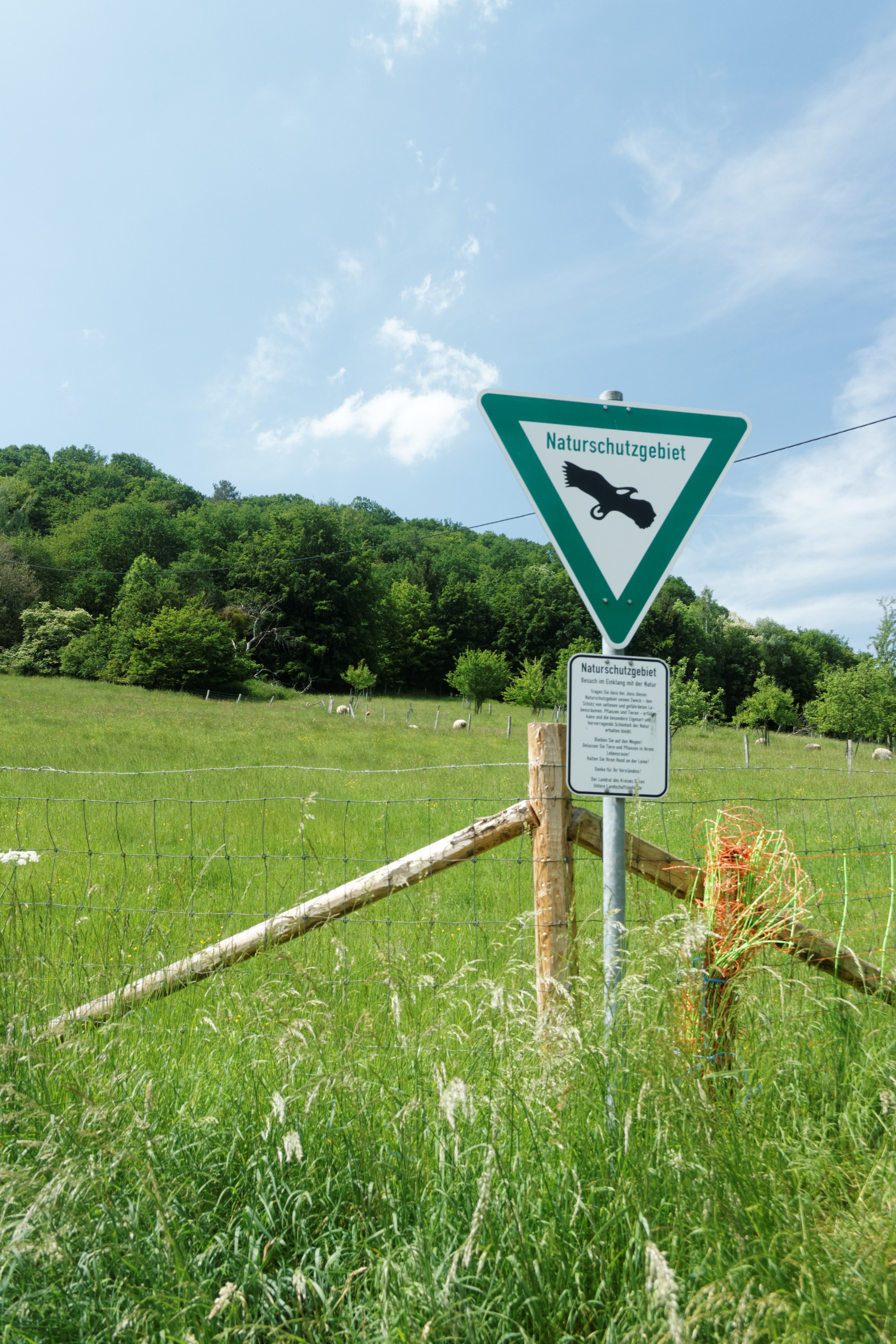 Naturschutzgebiet-Schild am Meuchelberg